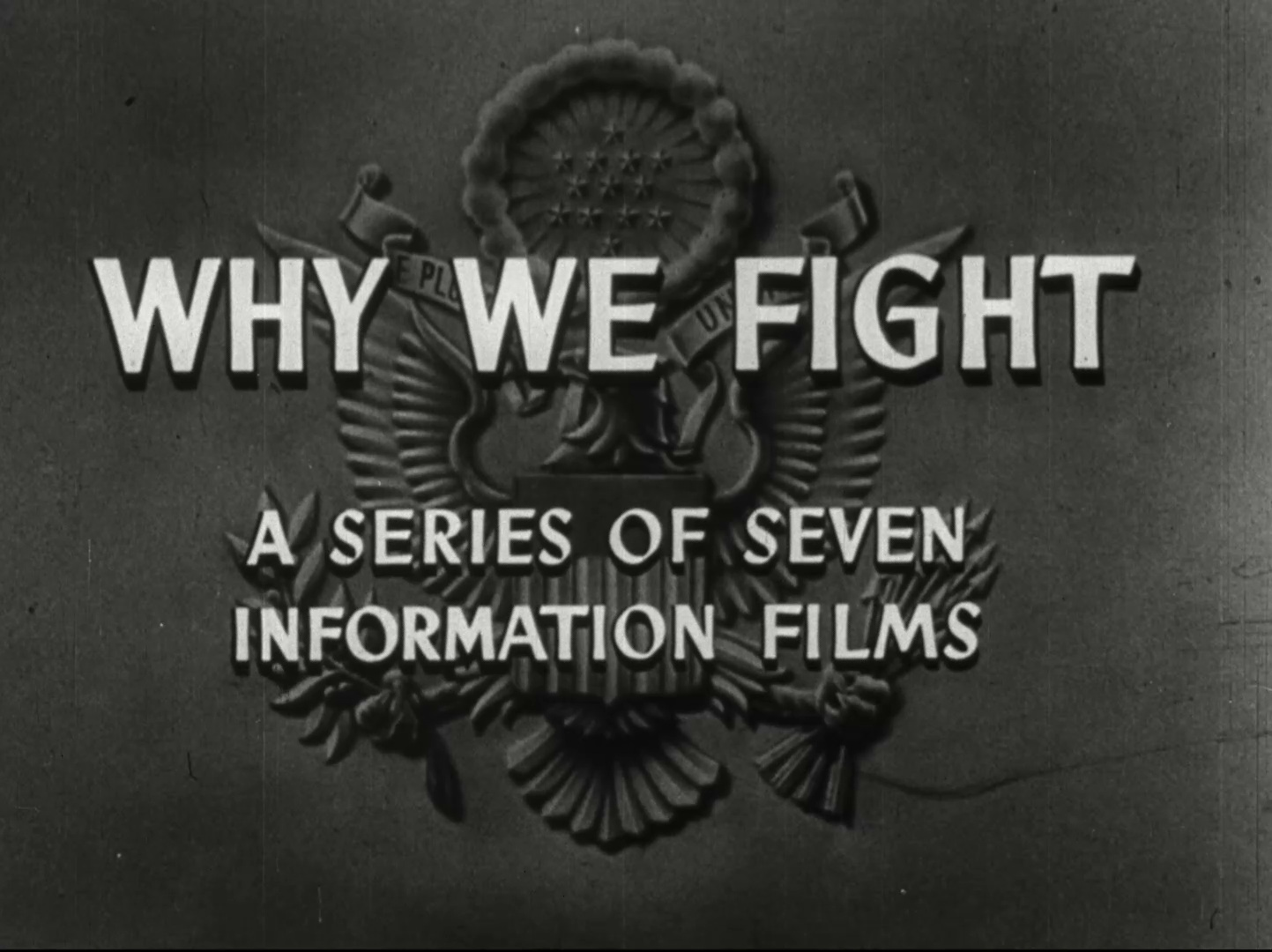 Captura de imagen de la serie de documentales Why We Fight.